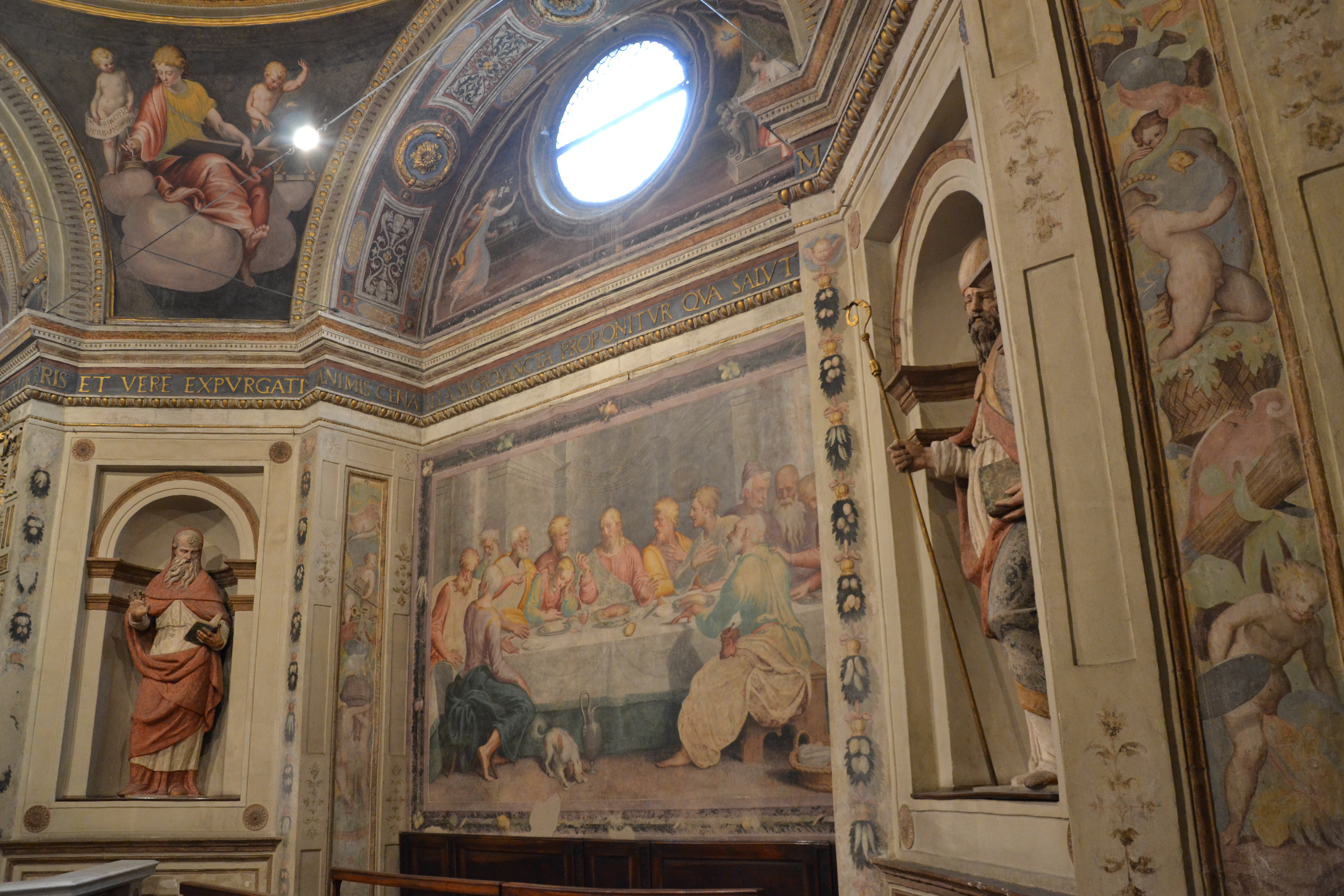 Chiesa dei Santi Fermo e Rustico (Caravaggio)